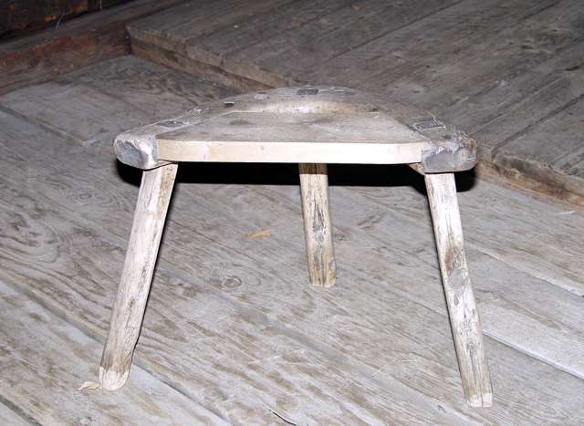 Melkekrakk fra Budalen i Sør-Trøndelag. Høyde 33. cm. Foto Haakon Harris / Norsk Folkemuseum NF.1951-0950.